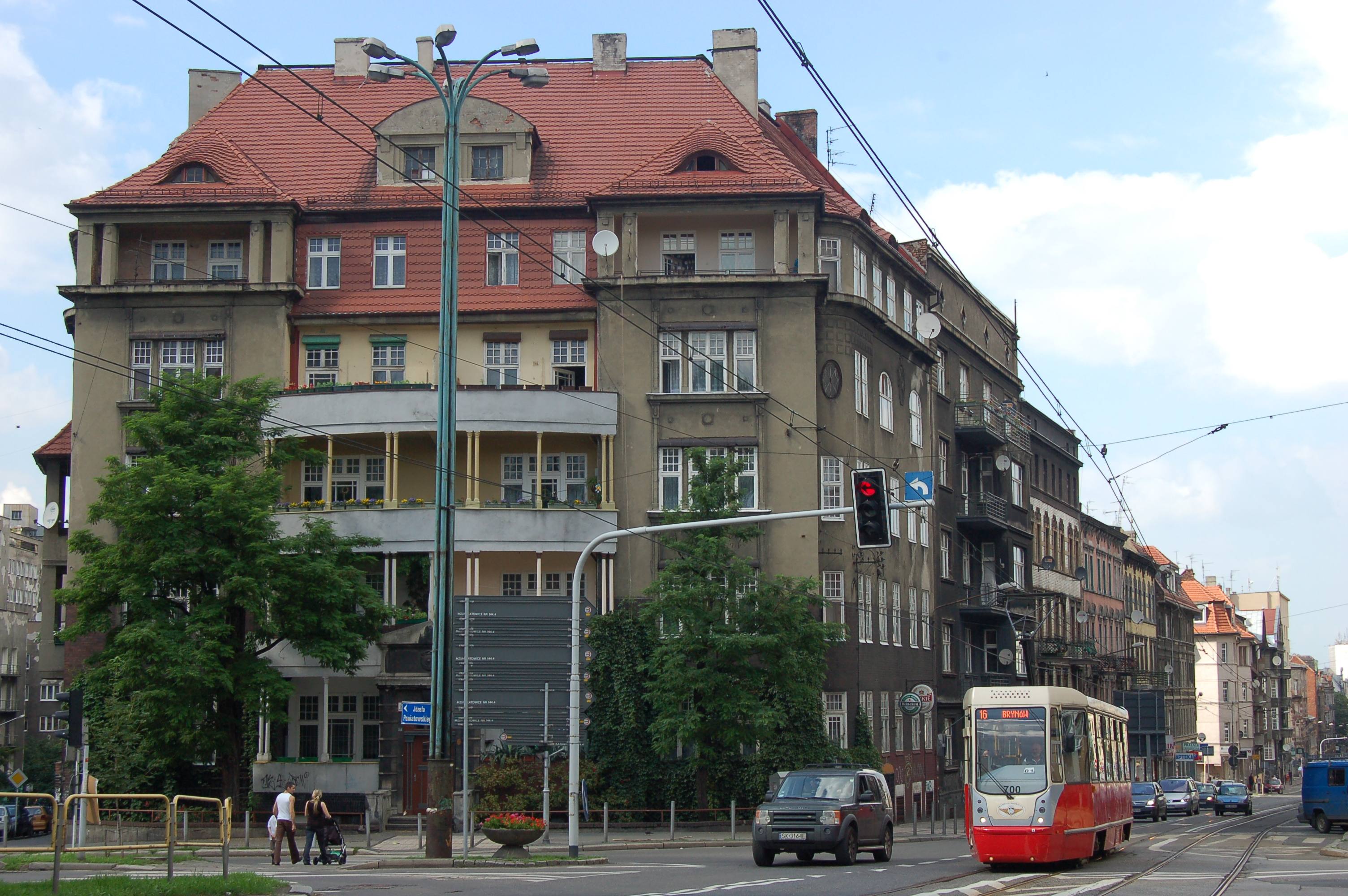 Katowice - Budynek na rogu ul. Kościuszki i ul. Poniatowskiego